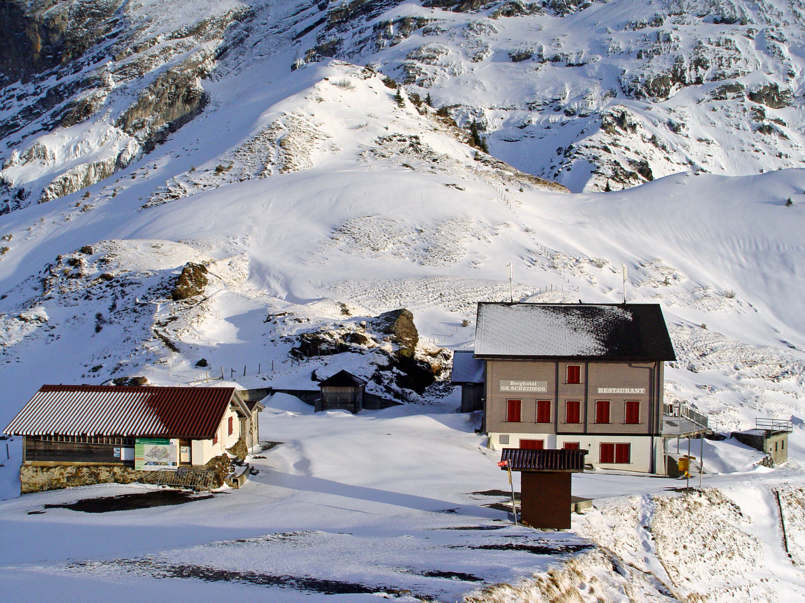 Große Scheidegg im Winter